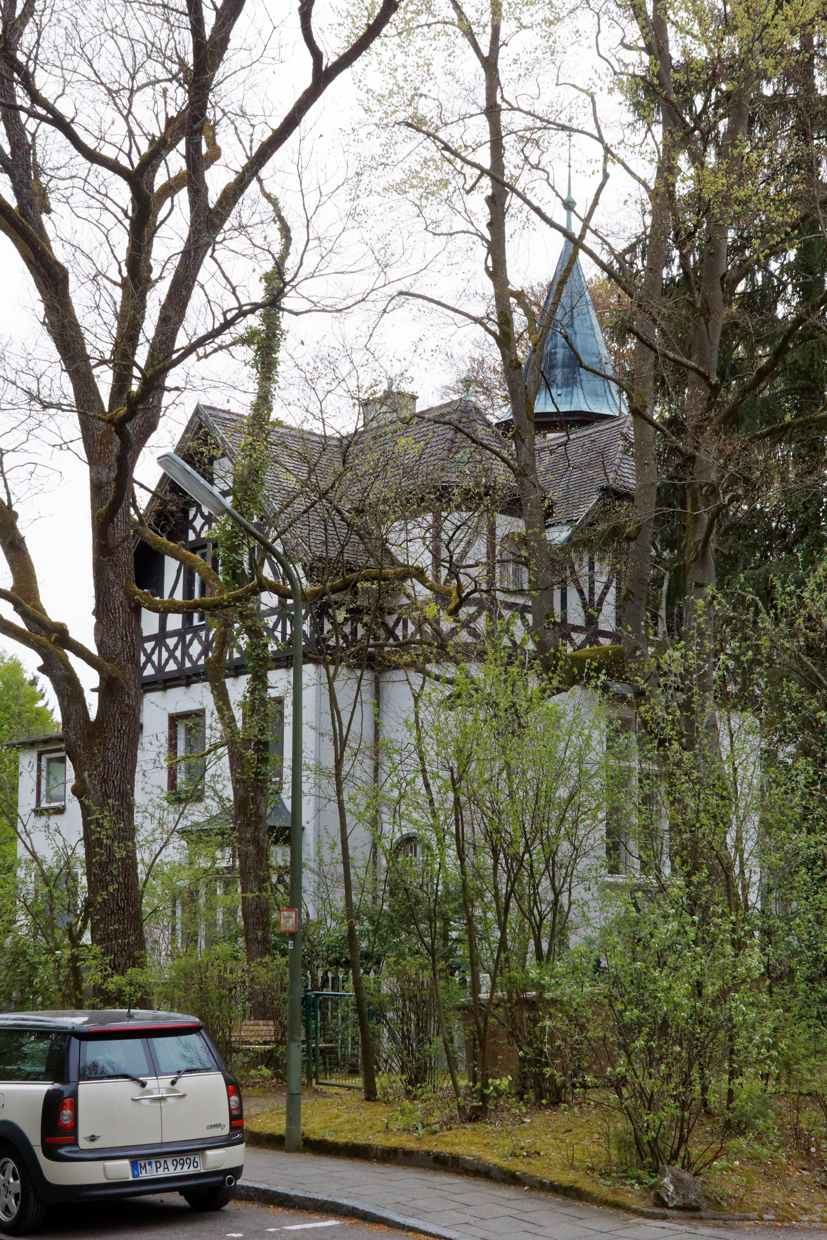 Villa Borscht in der Heilmannstraße 33 in München